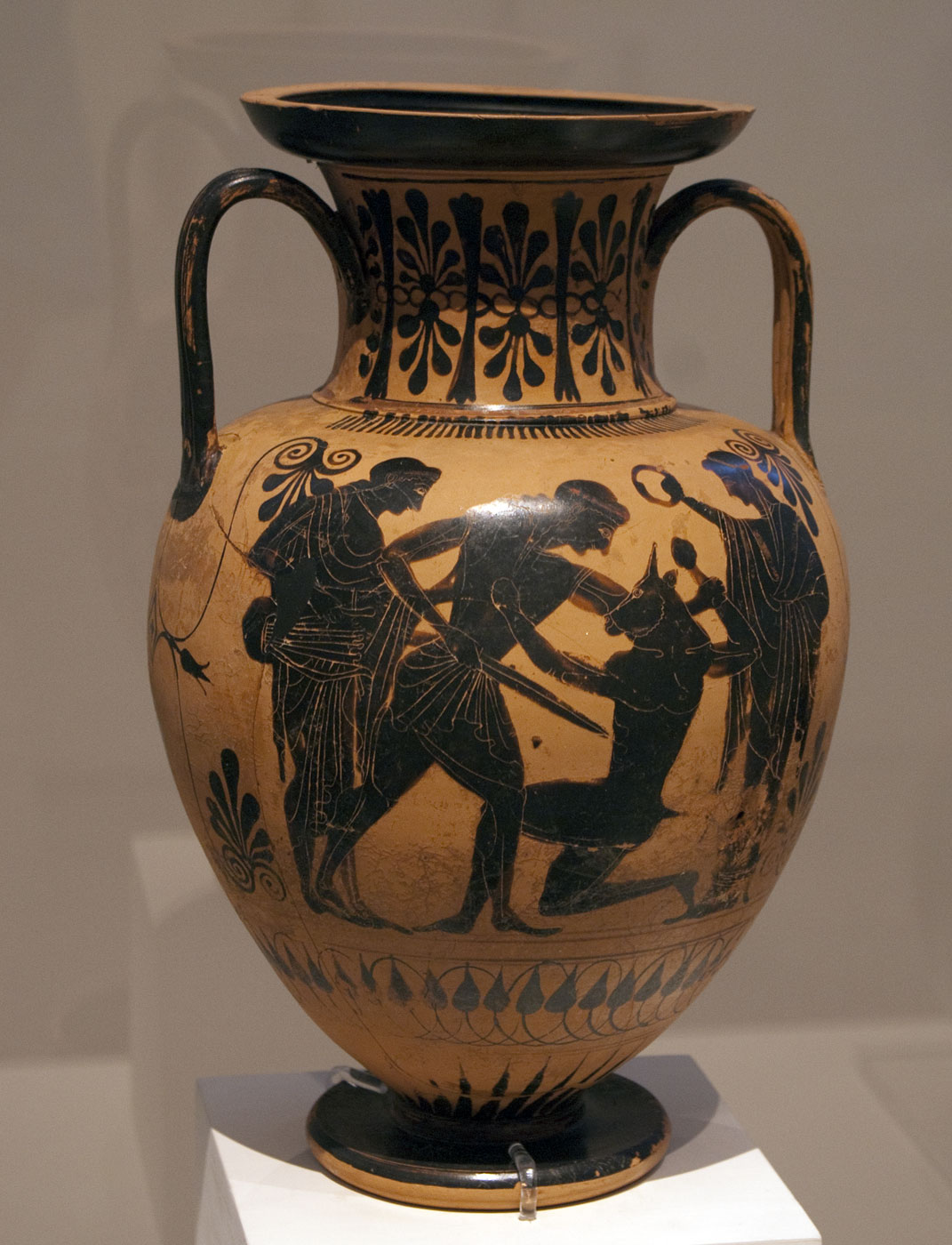 Thésée tuant le Minotaure. Vers -480. Amphore. Musée national archéologique d'Athènes.